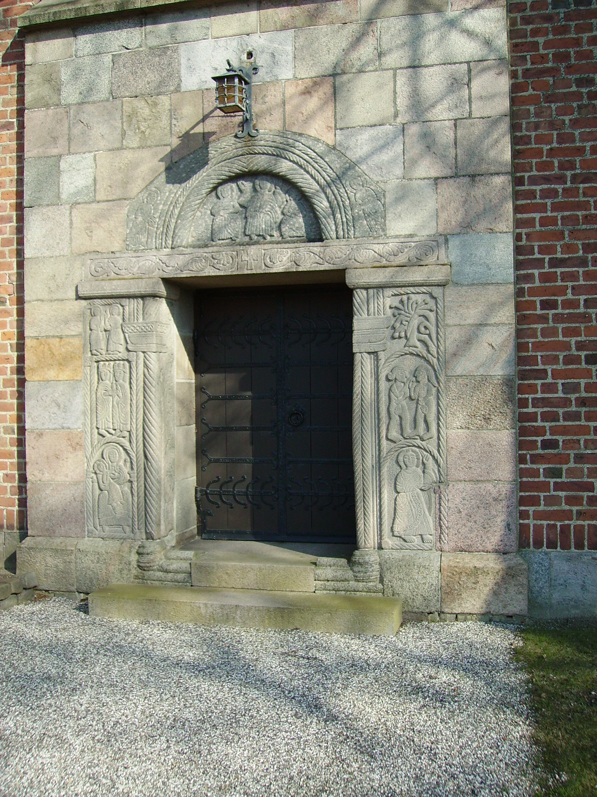 Vejlby Kirke,Norddjurs Kommune. Hårders protal